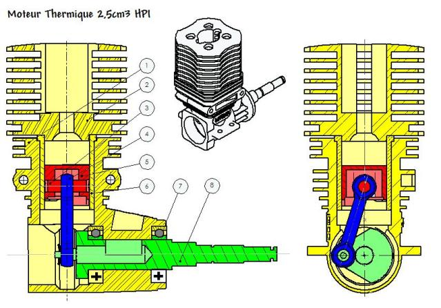 Mise en plan sous SolidWorks, d'un moteur thermique. 2 temps. Diesel (allumage par compression). Carburant (nitrométhane+huile). Bloc en jaune, piston en rouge, bielle en bleu, vilebrequin en vert.